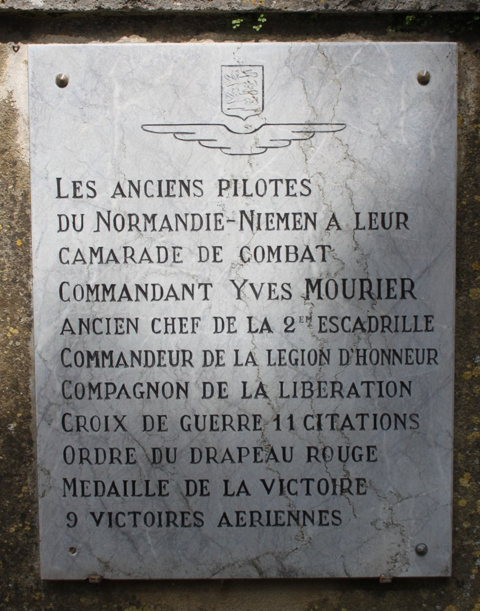 Plaque commérative deposé par les anciens pilotes du "Normandie Niemen" à Fabrezan à la mémoire de leur camarade.